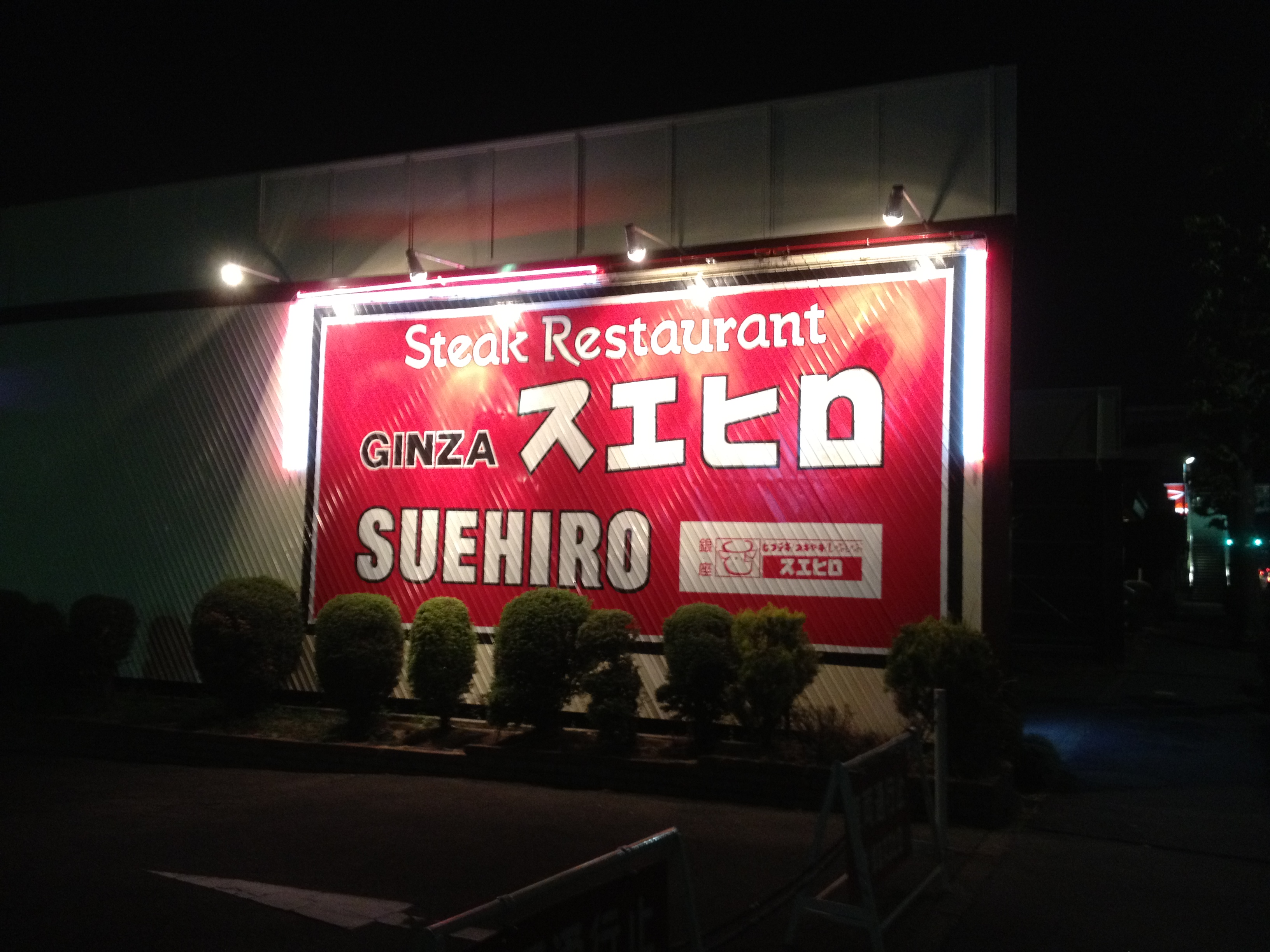 看板例（環八沿い）